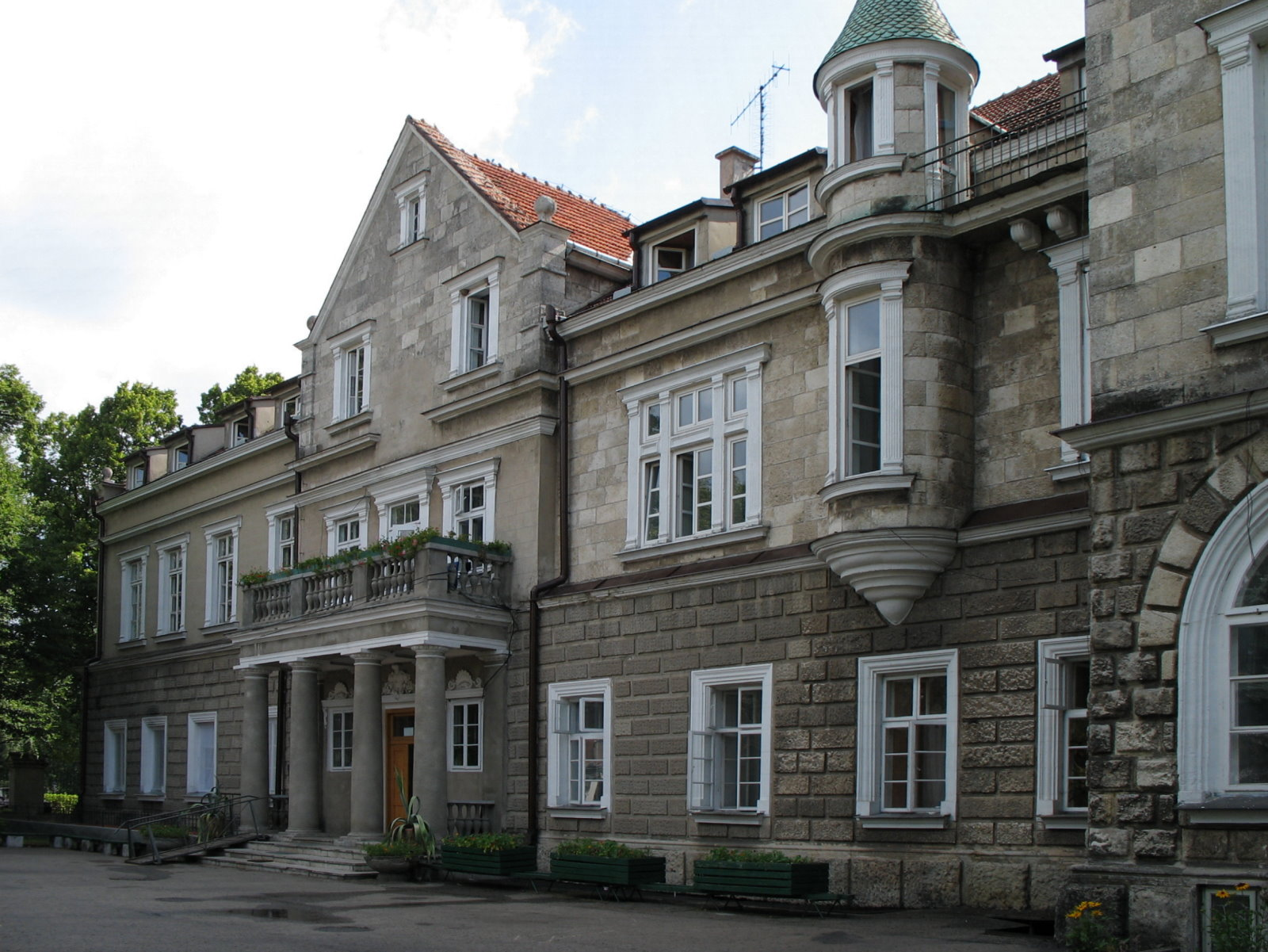 Horyniec (Poland), palace